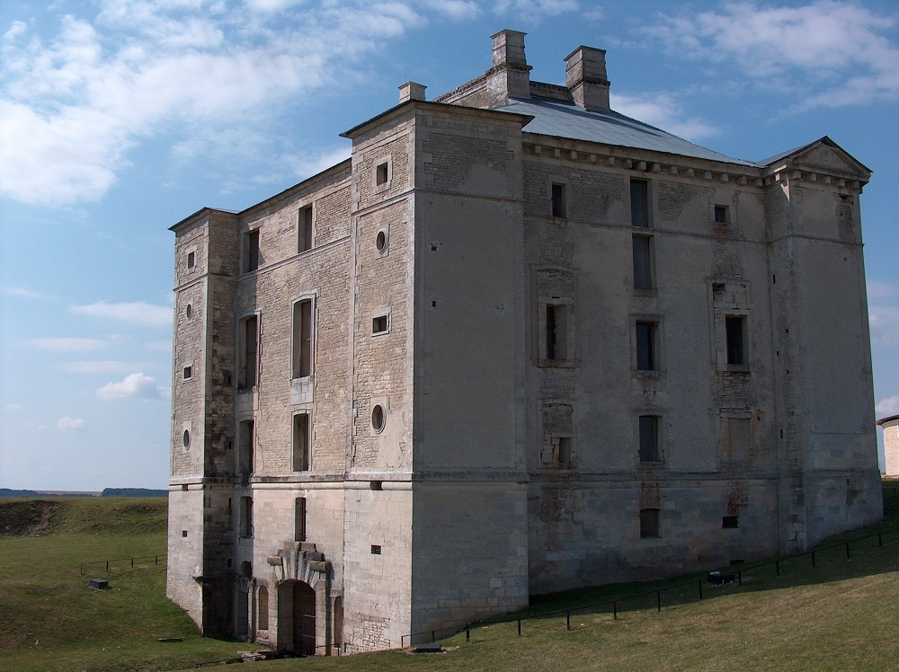 Château de Maulnes .